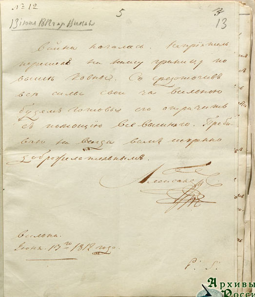 Письмо императора Александра I председателю Государственного совета генерал-фельдмаршалу графу Н.И. Салтыкову о начале войны с Францией. 13 июня 1812 г. РГВИА. Ф. 846. Оп. 16. Д. 493. Л. 13